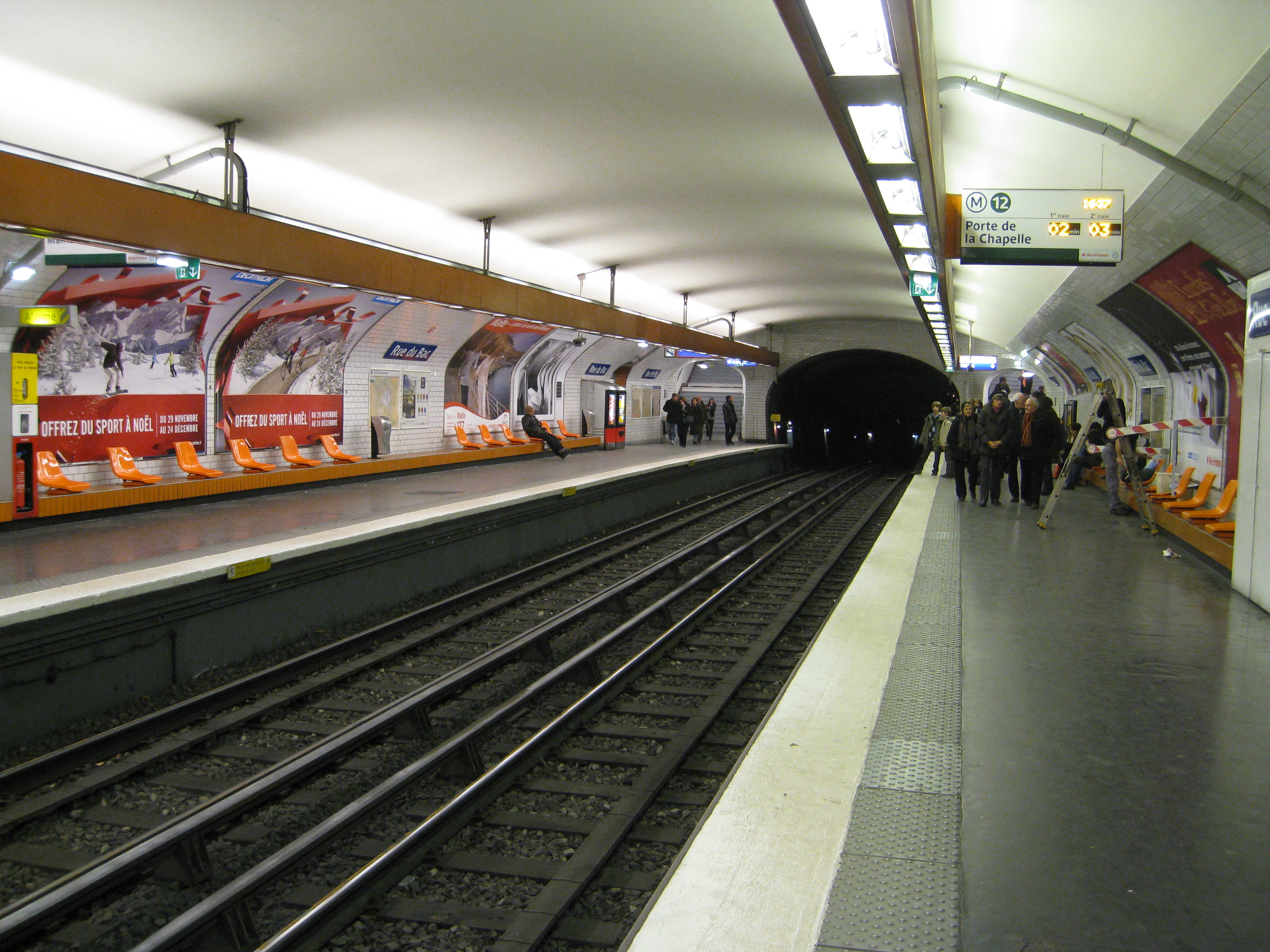 Rue du Bac, ligne 12 du métro de Paris, France